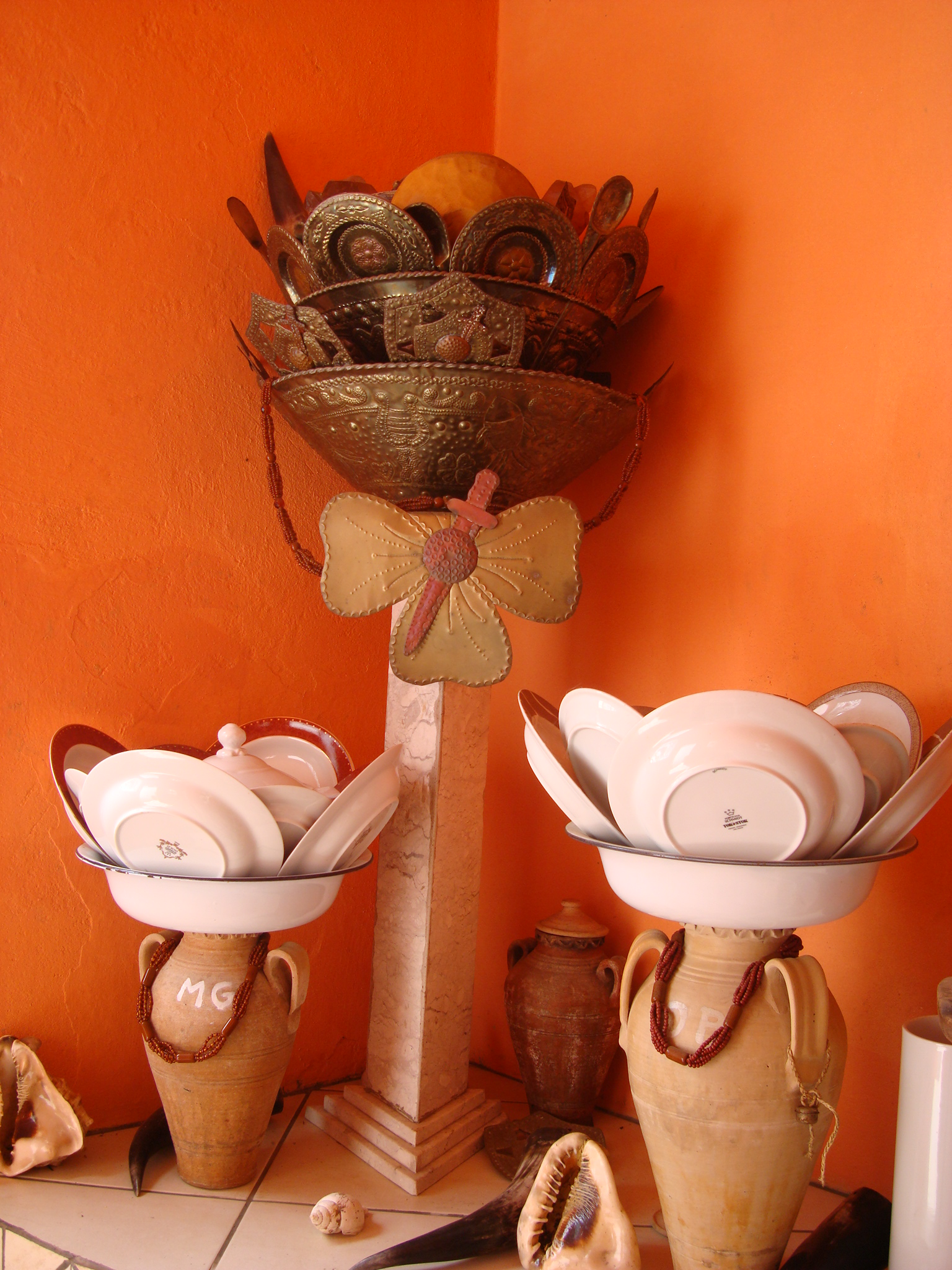 Assentamento de Oya e Oba, Salvador, Bahia, Brasil.